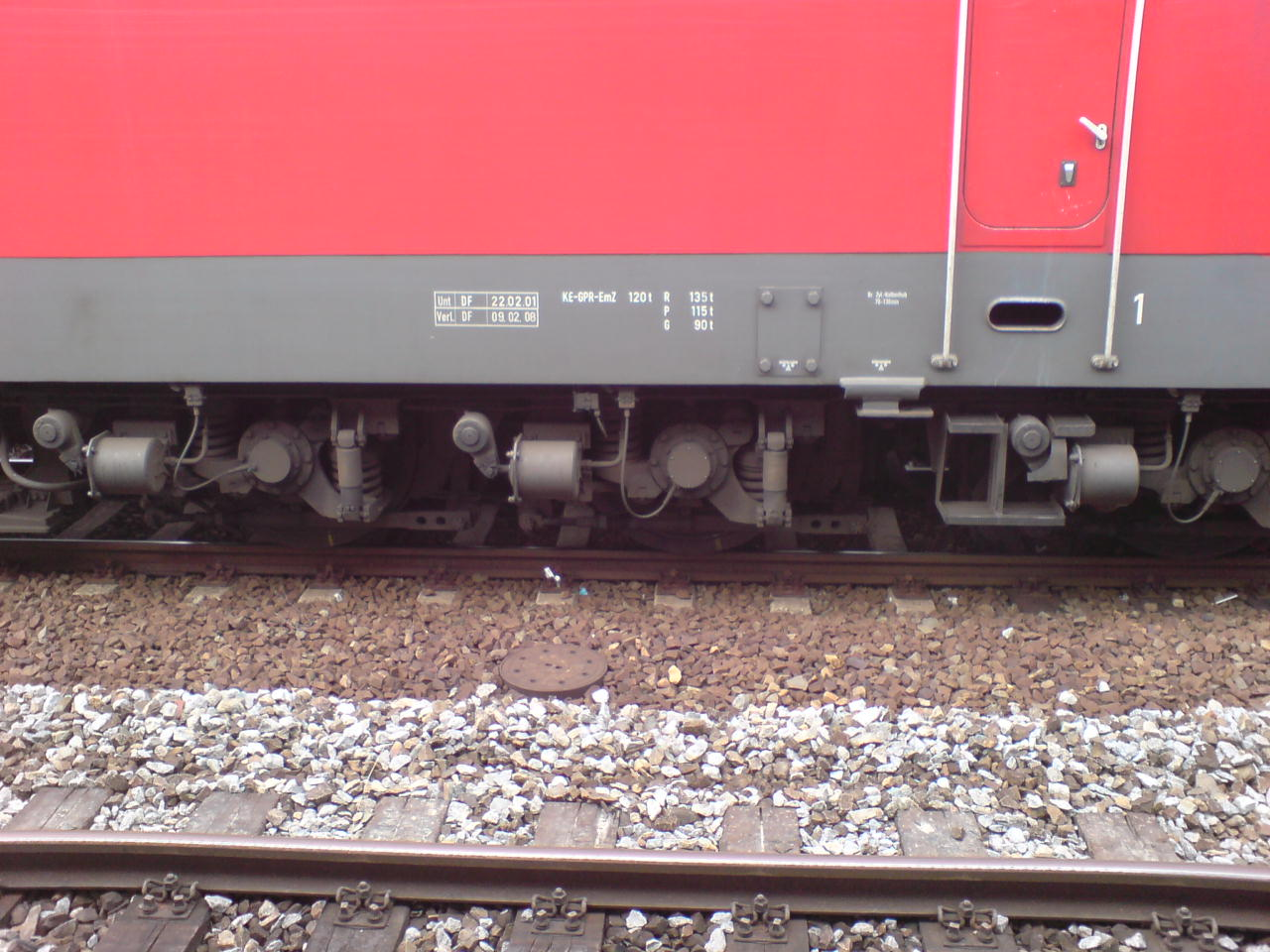 Drehgestell der Baureihe 156 (bzw. BR 252) in der Detailaufnahme. MEG 804 in Riesa am 08. August 2007